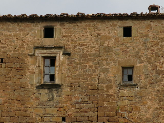 Castell d'Olius al Solsonès - Catalunya